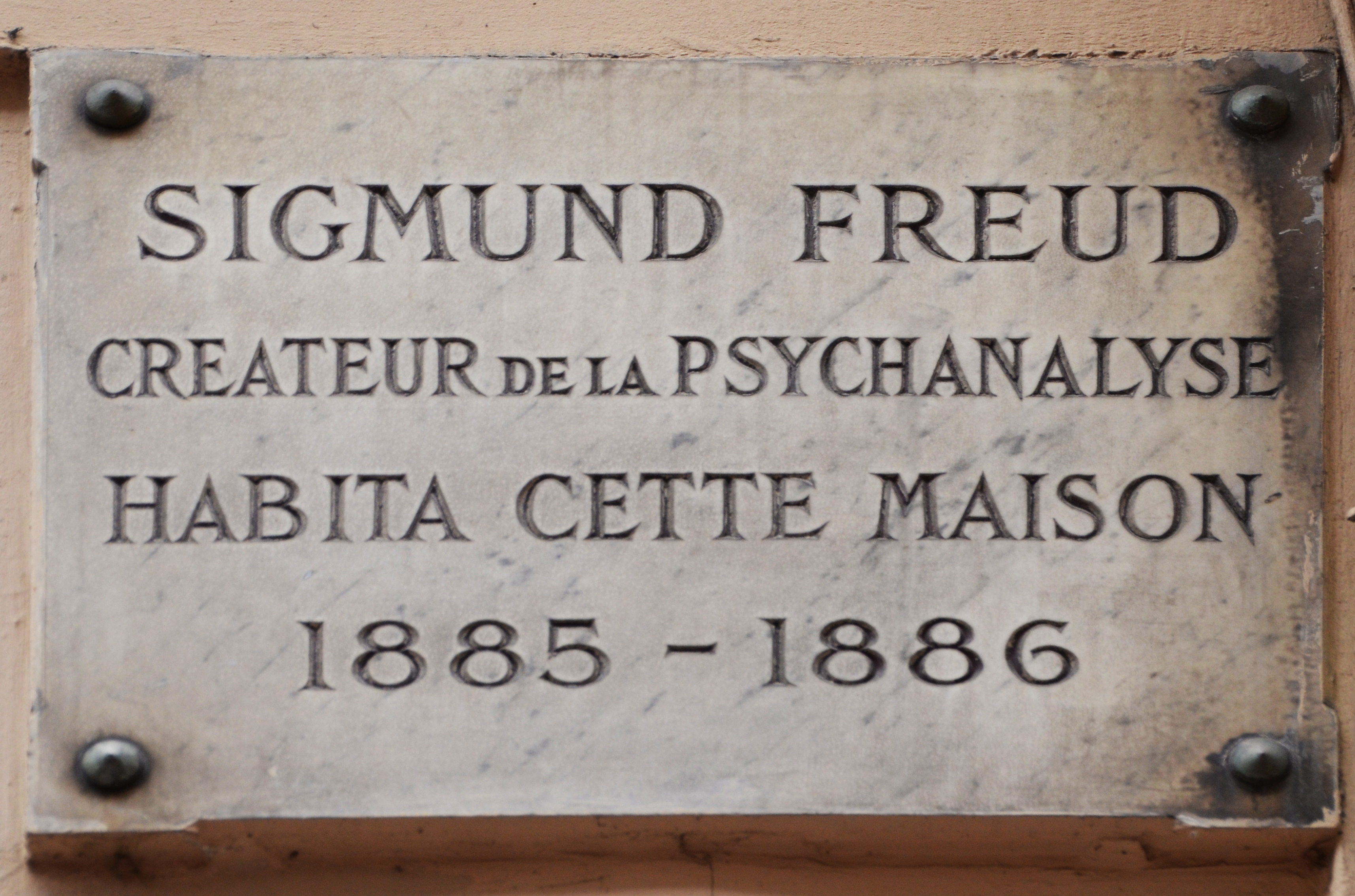 Sigmund Freud plaque - 10, rue le Goff, Paris 5